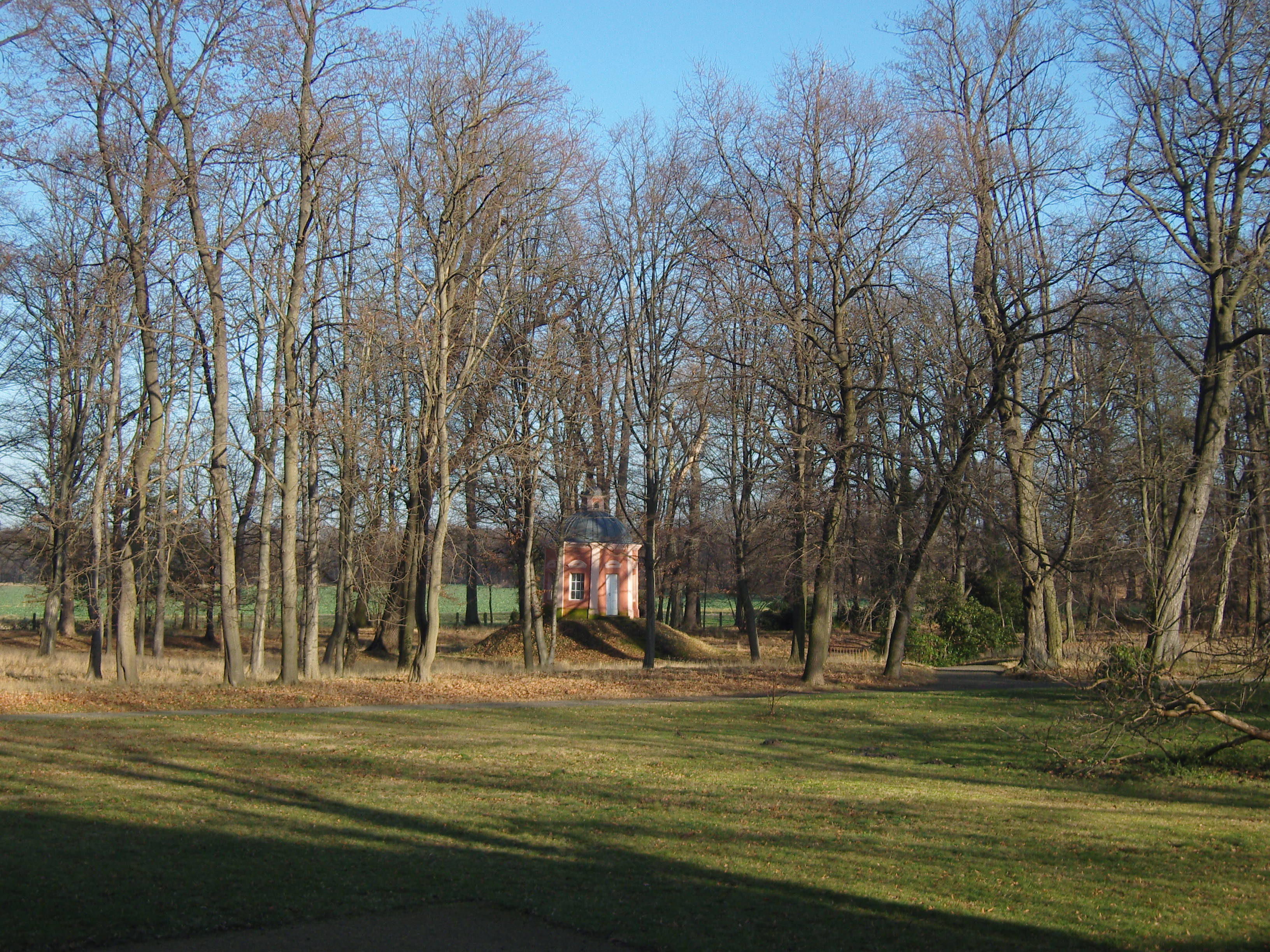 Schloßpark mit Pavillon in Großkmehlen